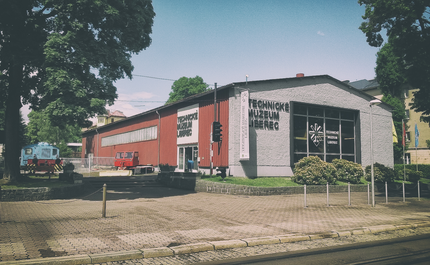 Průčelí budovy Technického muzea Liberec